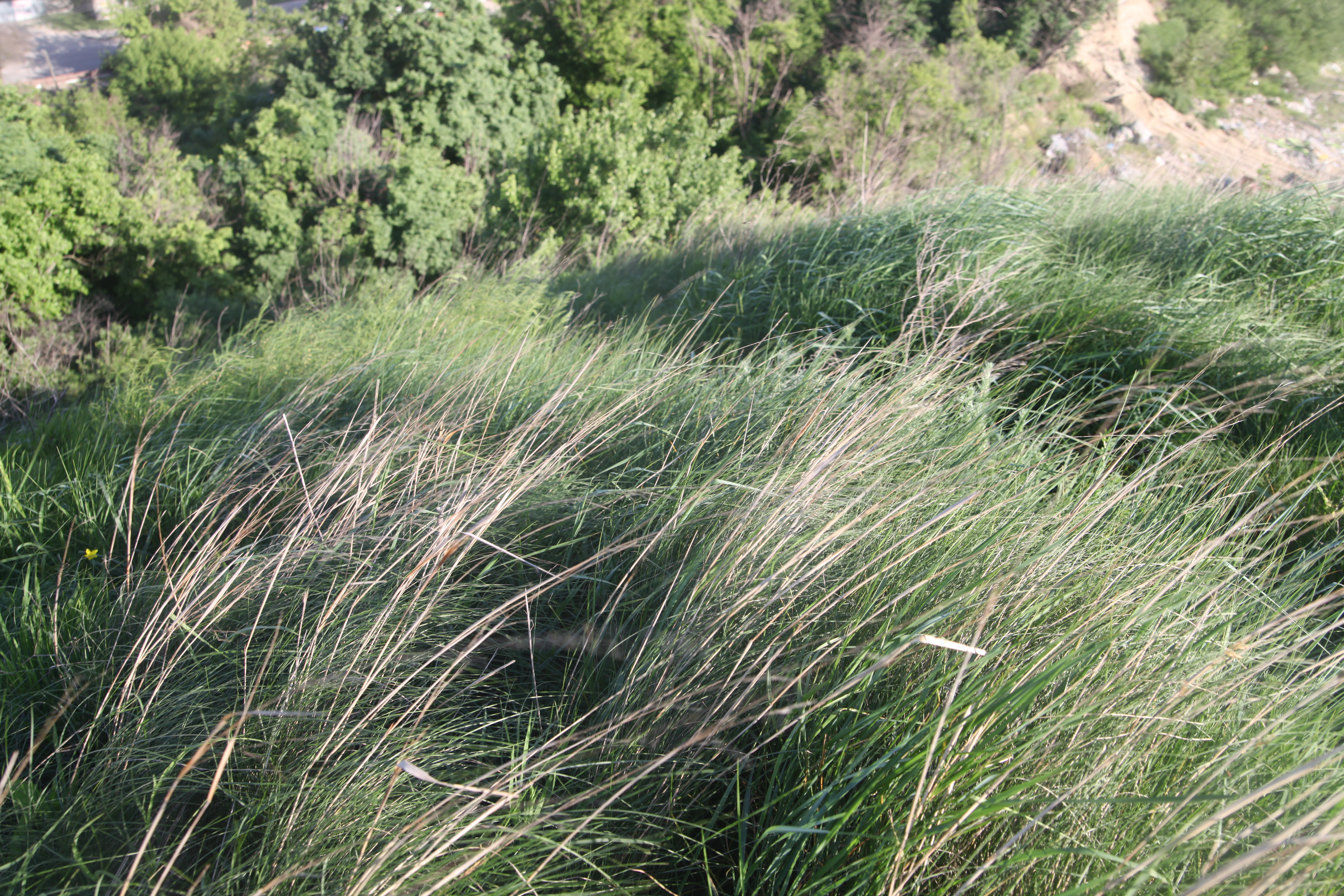 Природний об'єкт цілини, Голосіївський район вул. Червонопрапорна,76